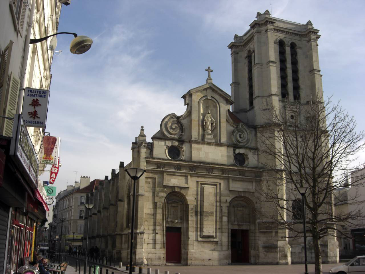 L'église Notre-Dame-des-Vertus à Aubervilliers, façade baroque (1628 décidée sous Louis XIII, et côté rue Charron.